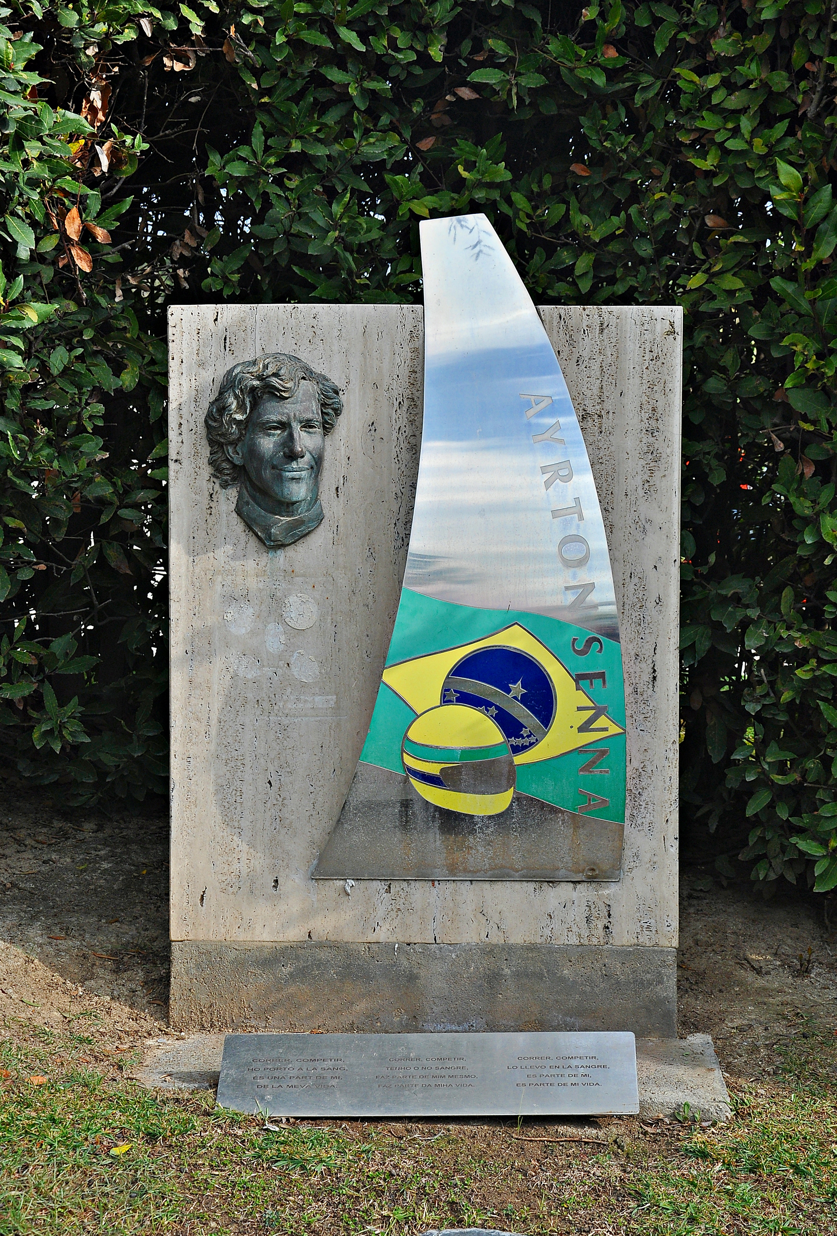 Circuito de Cataluña-2017